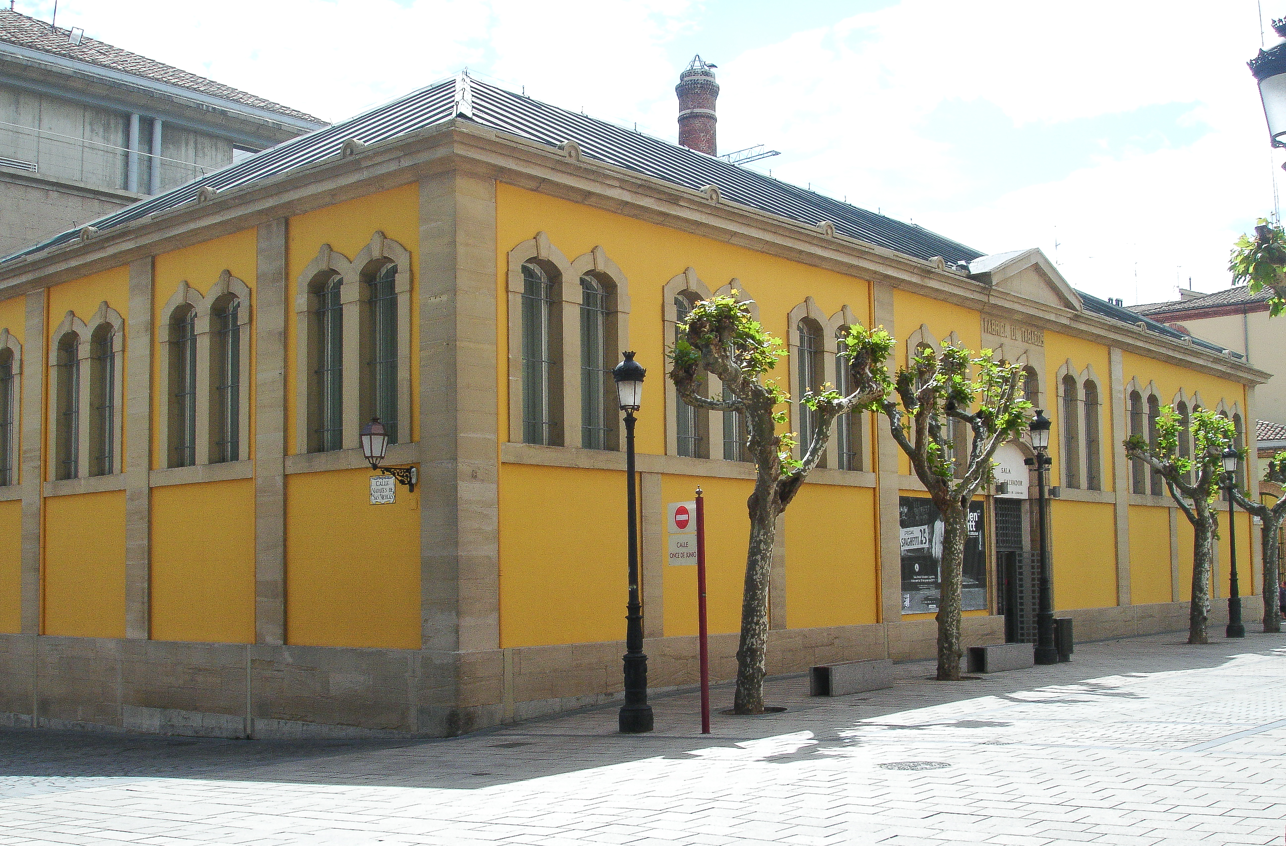 Fachada principal sala Amós Salvador, Logroño (La Rioja)